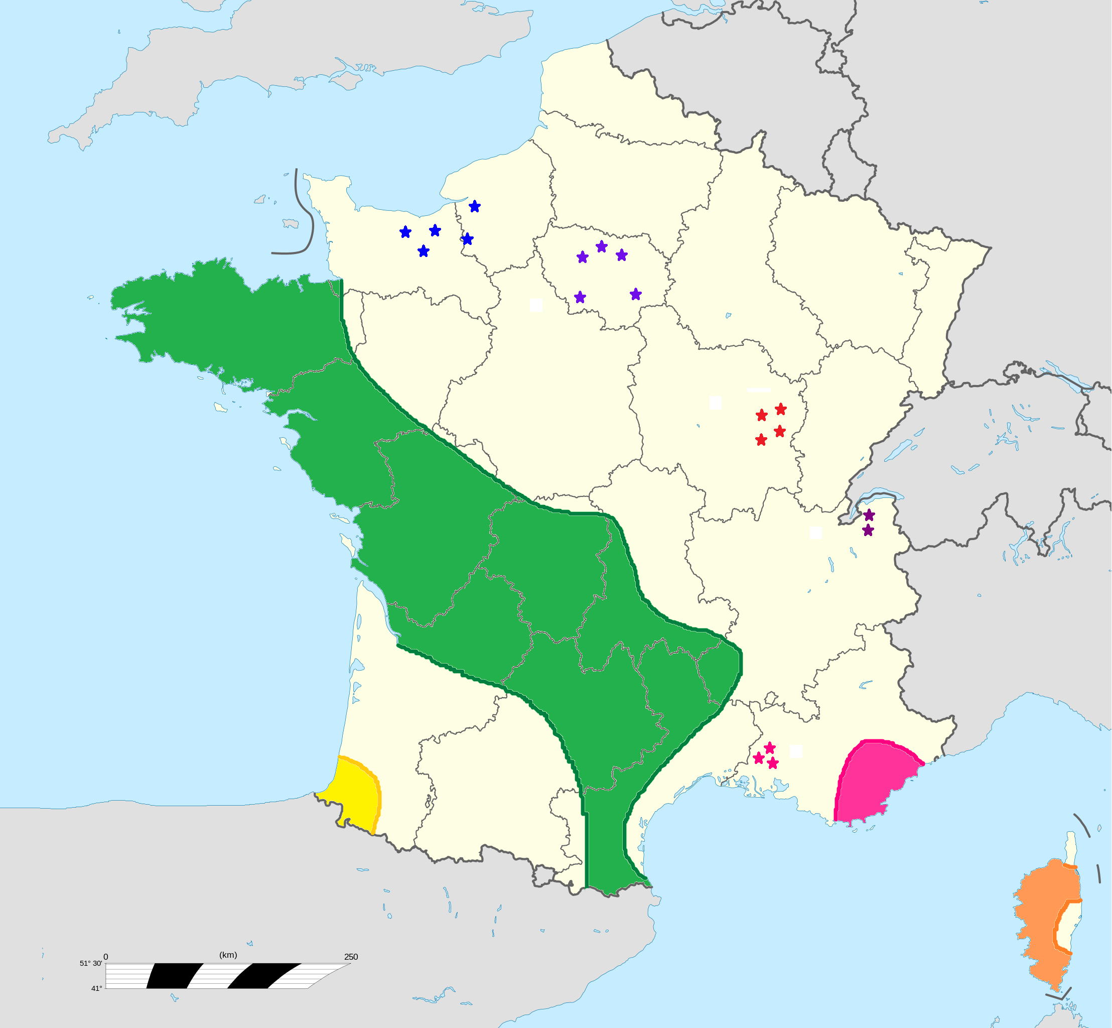 Les zones de couleur verte (Bretagne, Vendée, Limousin, Quercy, Causses, Languedoc, Ardèche) et orange (Corse) marquent les régions de forte implantation de dolmens, menhirs et cromlechs. Les autres zones sont pourvues en monuments mégalithiques mais de façon nettement moins importante.